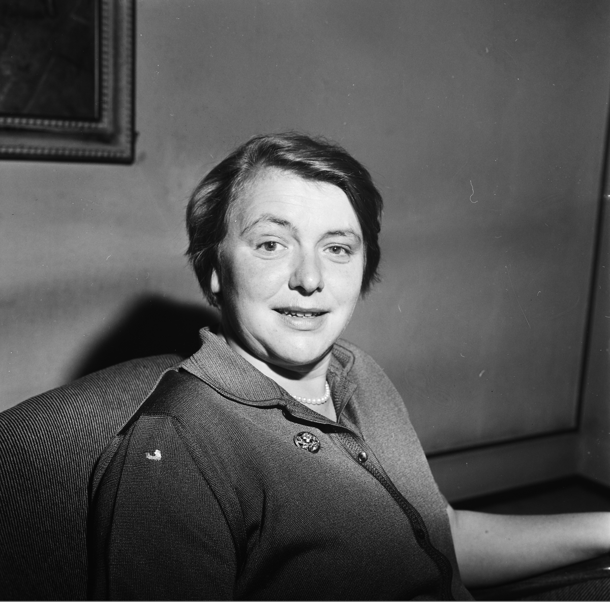 Gidske Anderson (1921-1993) var en norsk journalist og forfatter.